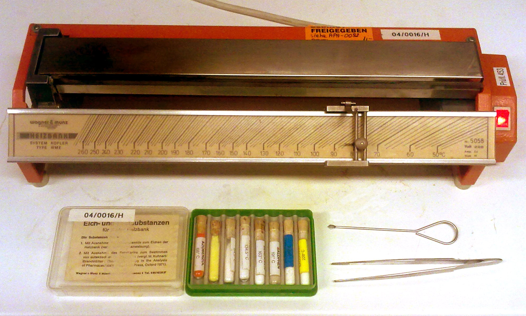 Kofler Bank